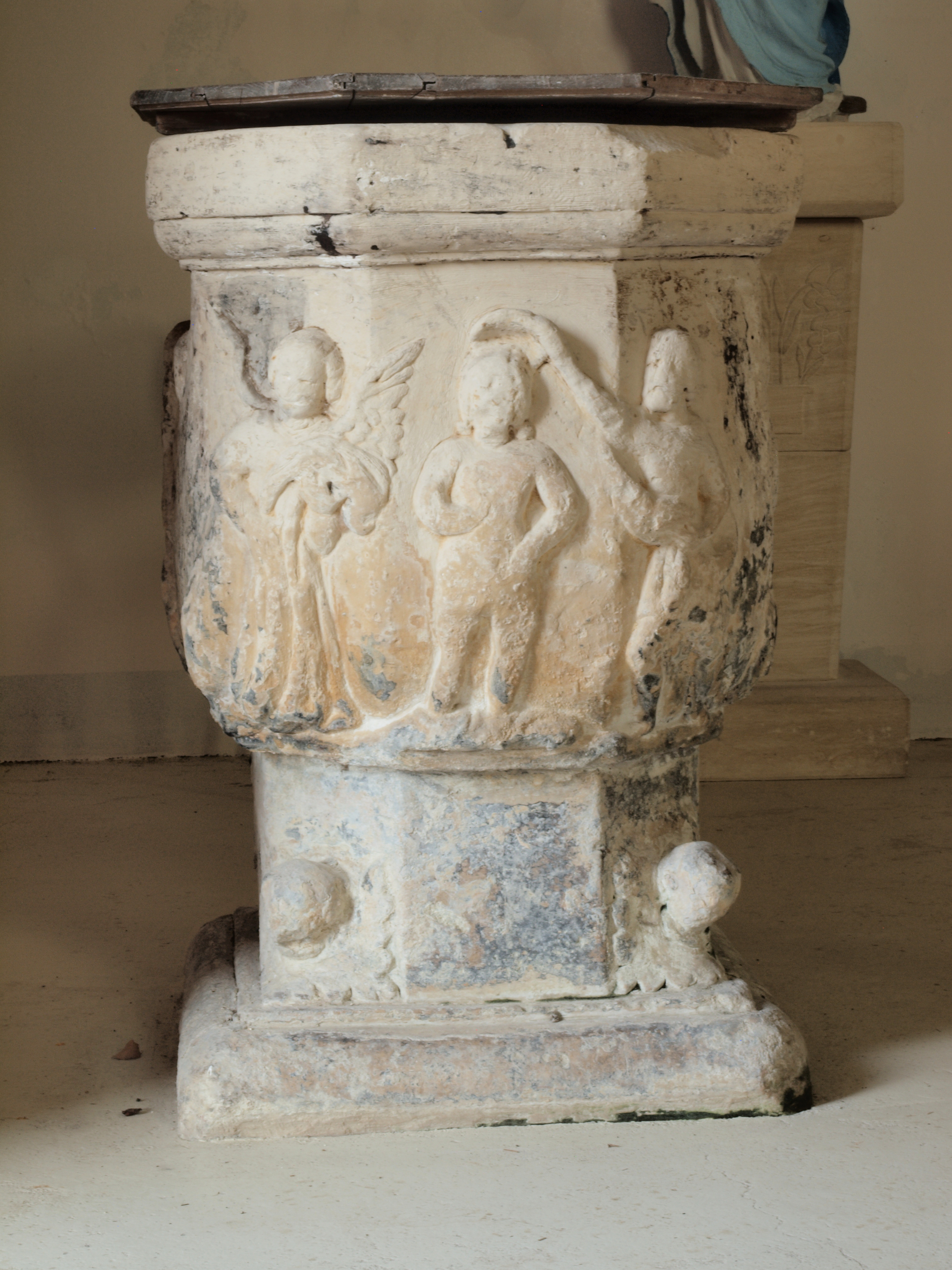 Monceaux-l'Abbaye (Oise, France) : les fonts baptismaux du XVe siècle